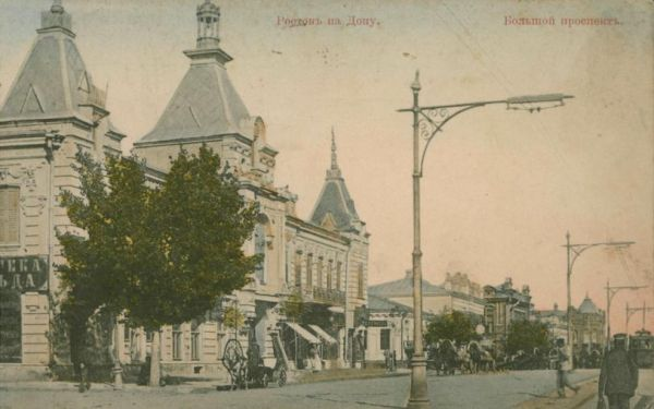 Доходный дом С. И. Шендерова на дореволюционной открытке. Ростов-на-Дону.